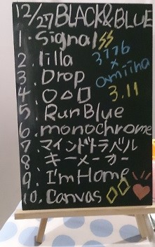 amiinaセトリボード(20151227(1))